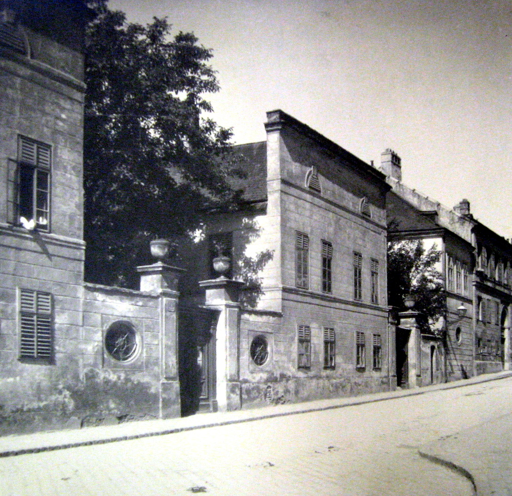 Gentz-Schlössel, Währingerstraße 169-171 (1918). Inv. PK 365